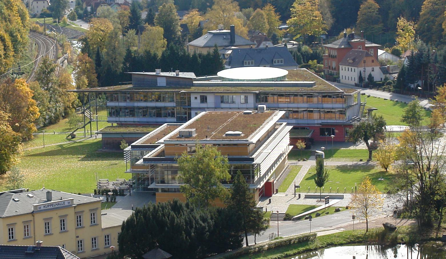 Roßmäßler-Bau und Judeich-Bau in Tharandt